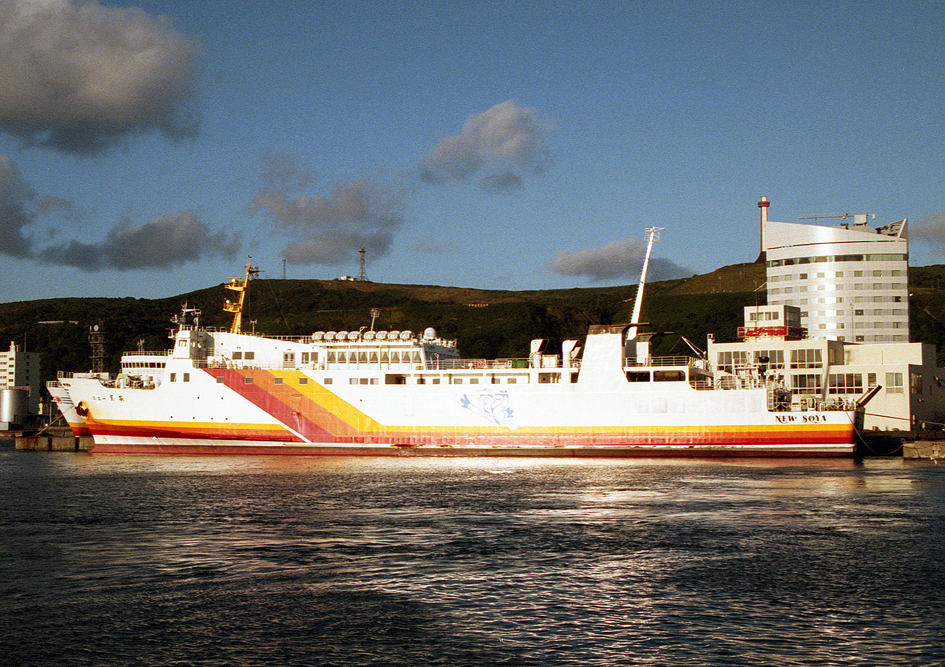 東日本海フェリー ニュー宗谷